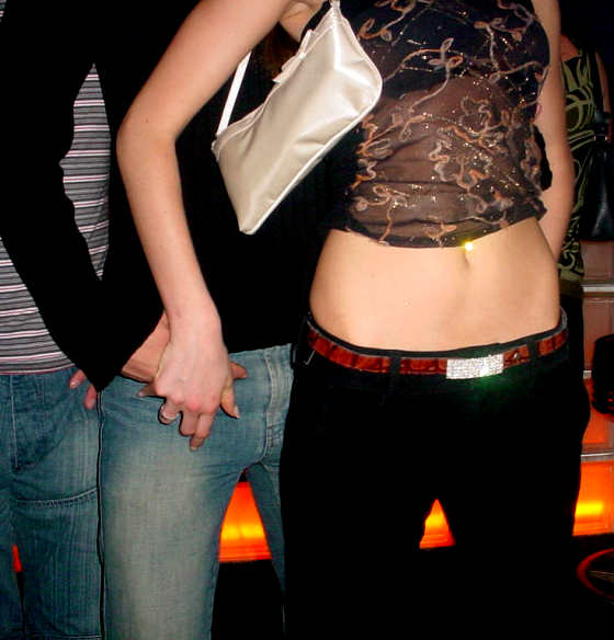 Bauchfreie Kleidung